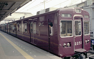 阪急 2251 1982年頃 十三駅